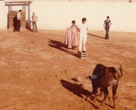 António Xavier na praça de touros de Tomar, pouco antes do acidente que o levaria à sala de operações.